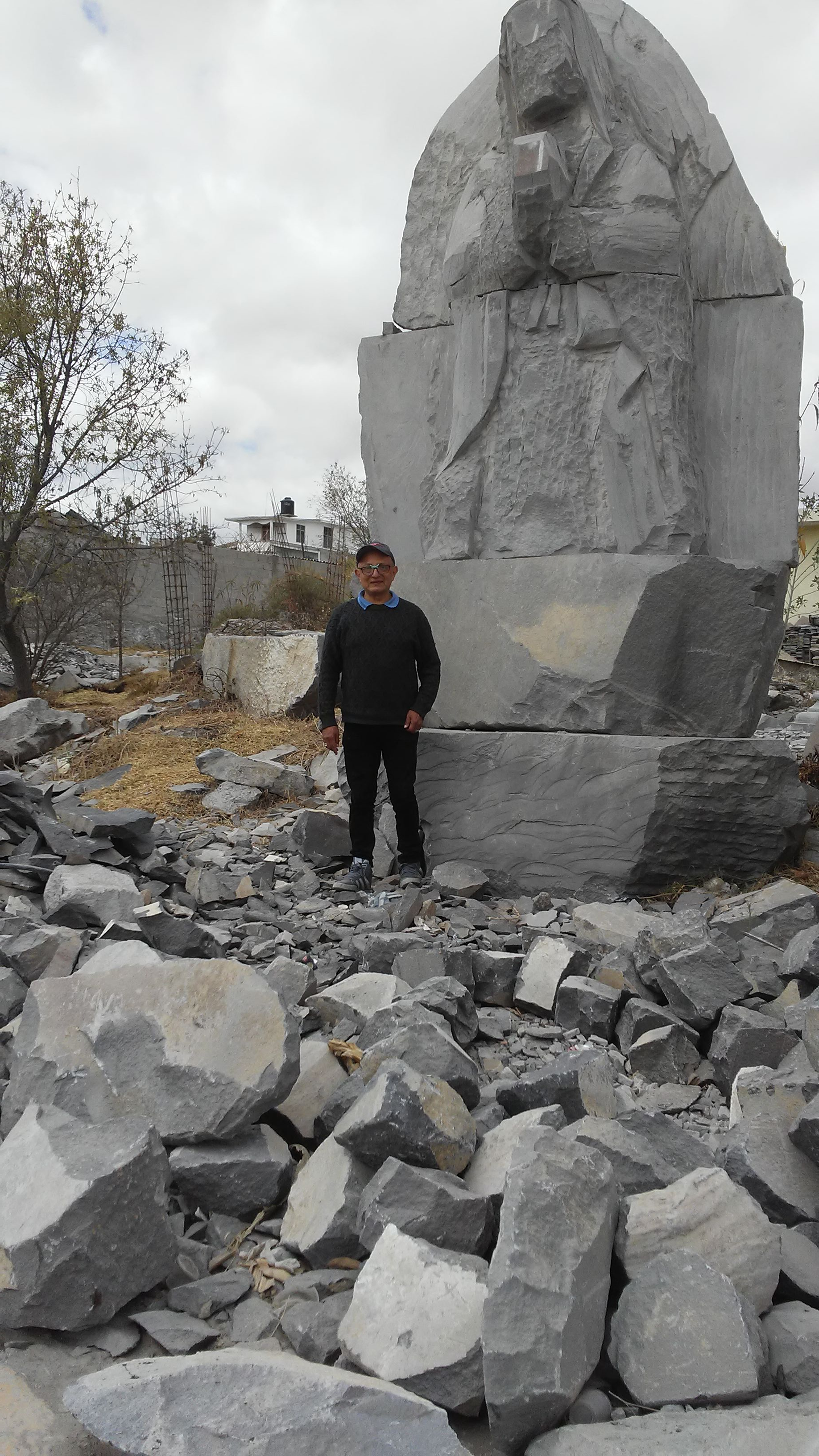 Escultura de la Virgen de Guadalupe en elaboración, cinco metros